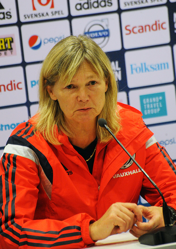 Anna Signeul